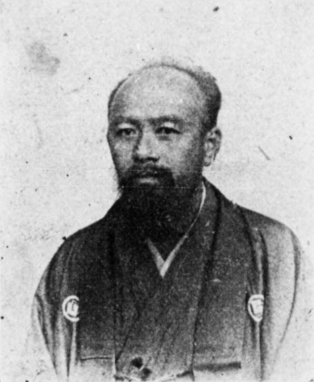 宮内 翁助